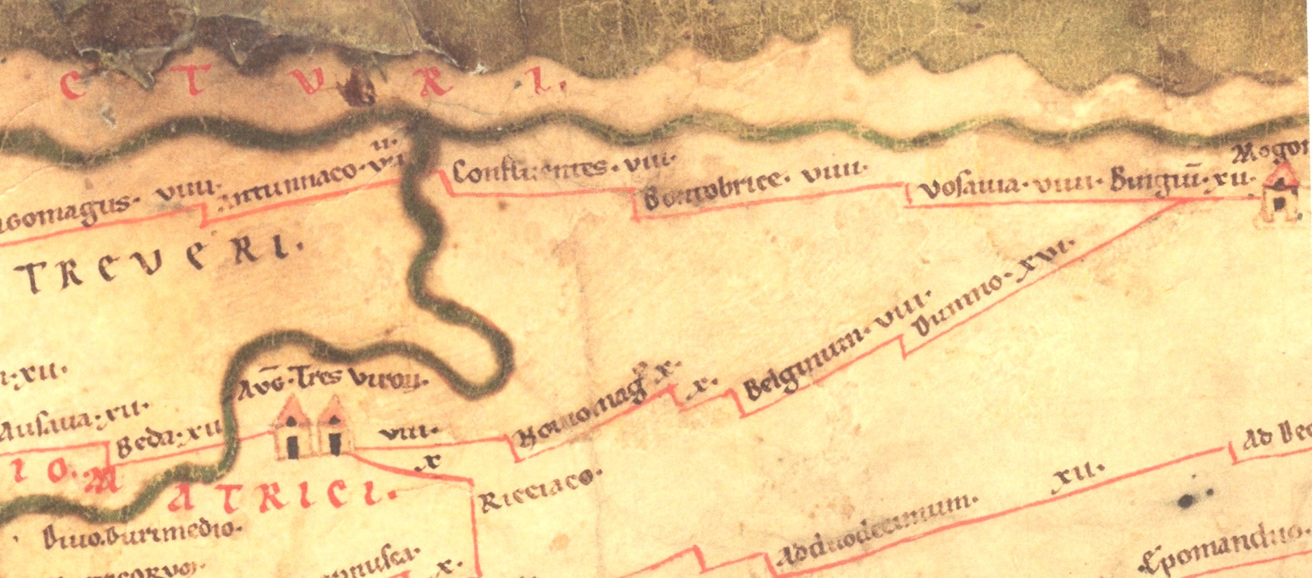 Kirchberg, Cartographie de Peuginger